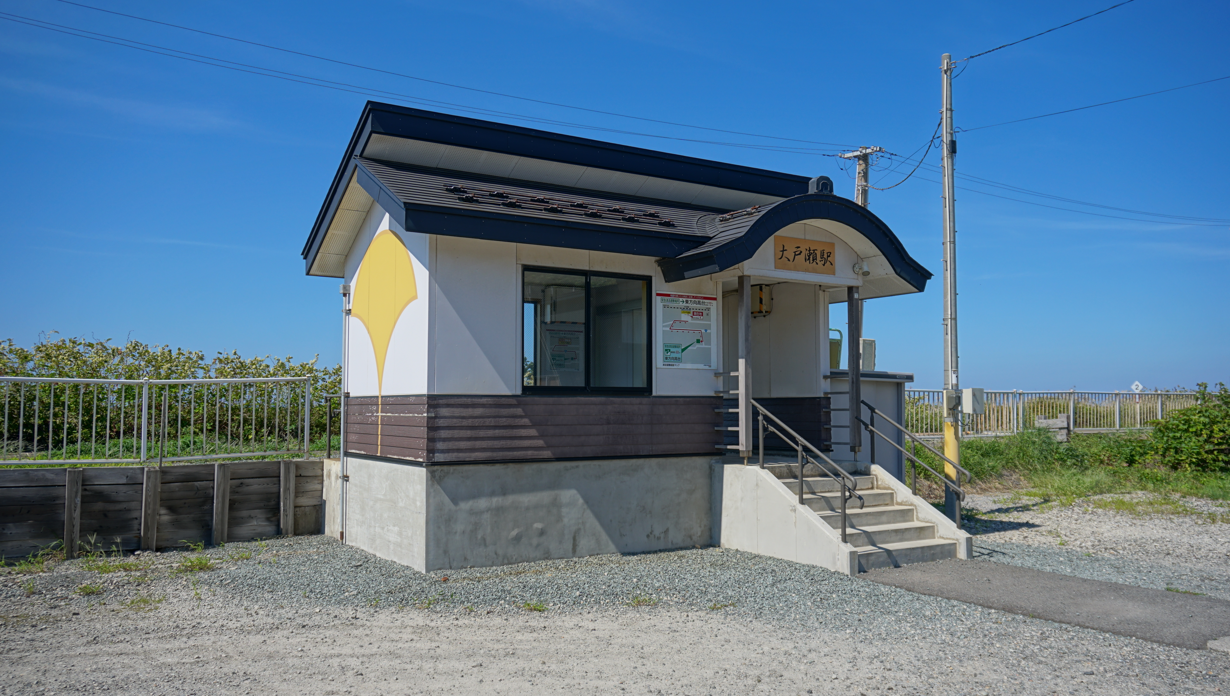 五能線 大戸瀬駅（青森県西津軽郡深浦町）